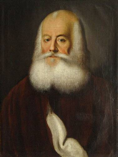 Portrait of Alexey Bestuzhev-Ryumin (1693-1768)label QS:Lru,"Портрет Алексея Петровича Бестужева-Рюмина. Государственный музей изобразительных искусств Республики Татарстан" label QS:Len,"Portrait of Alexey Bestuzhev-Ryumin (1693-1768)"